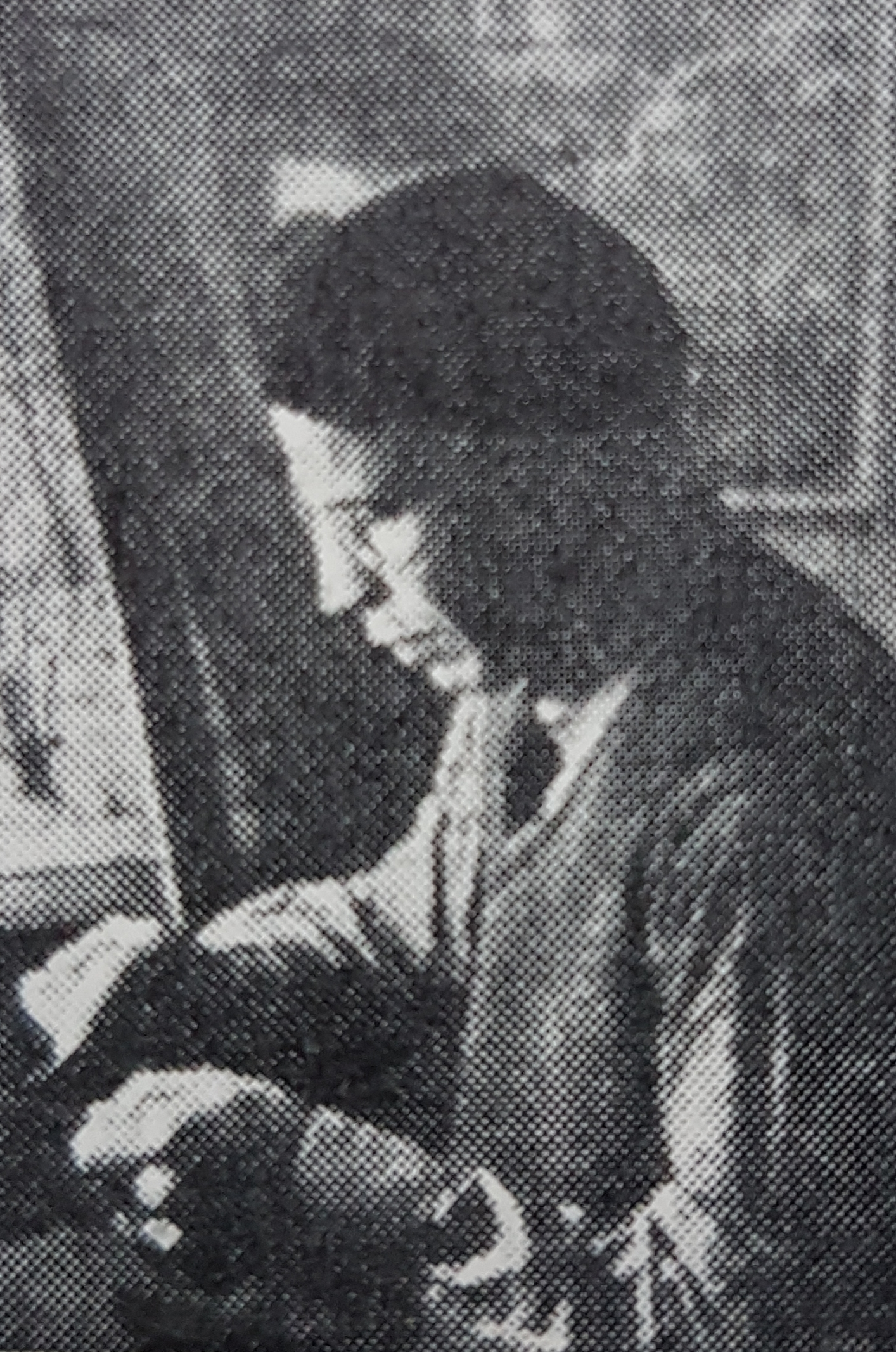 Björn Jonson , avfotograferad porträttbild från Allhems Svenskt konstnärslexikon.